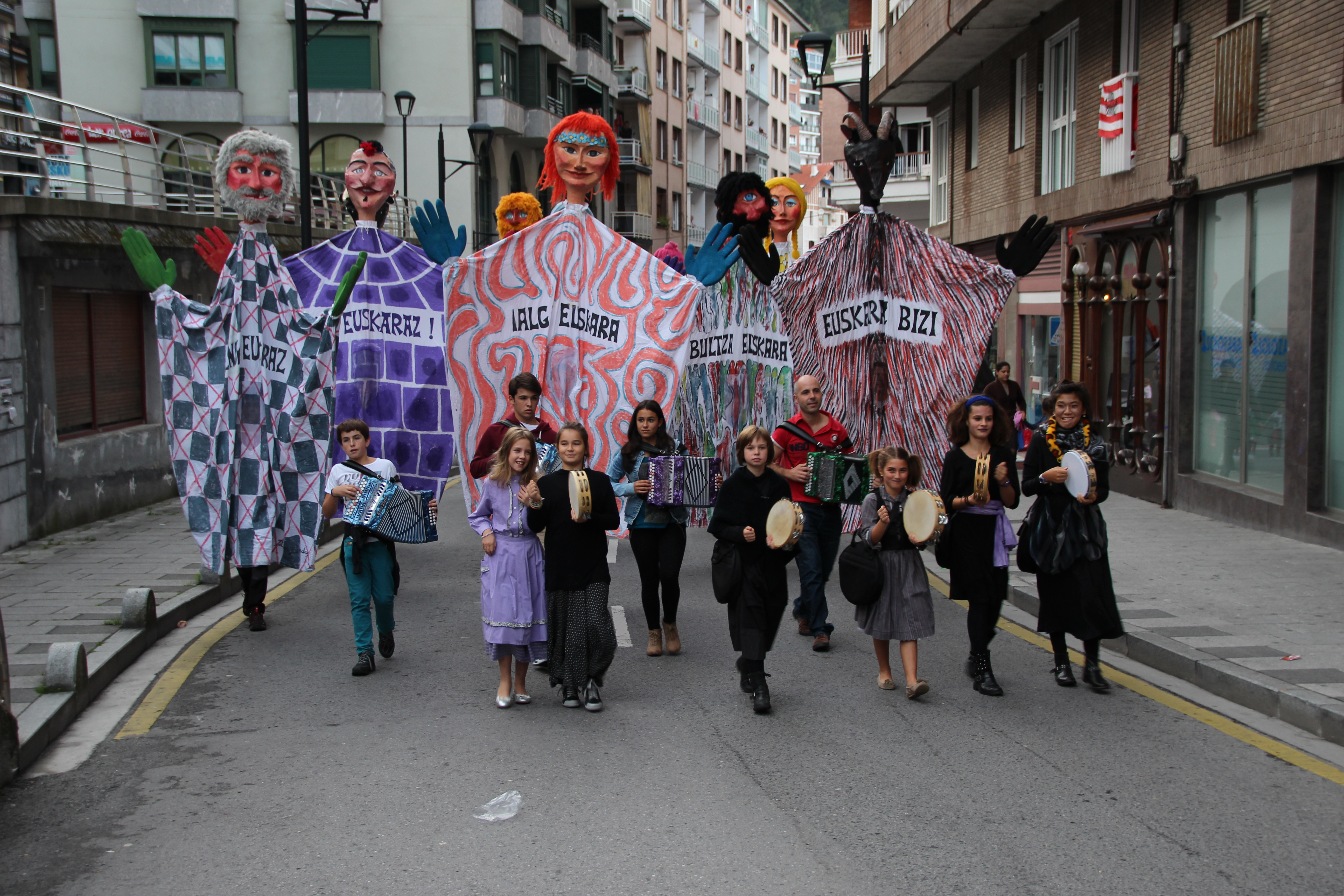 2014ko urriaren 13an Bitxore Lakari egindako omenaldia, berak egindako erraldoiak eta trikitilariak Ondarroako Antiguako Ama kalean